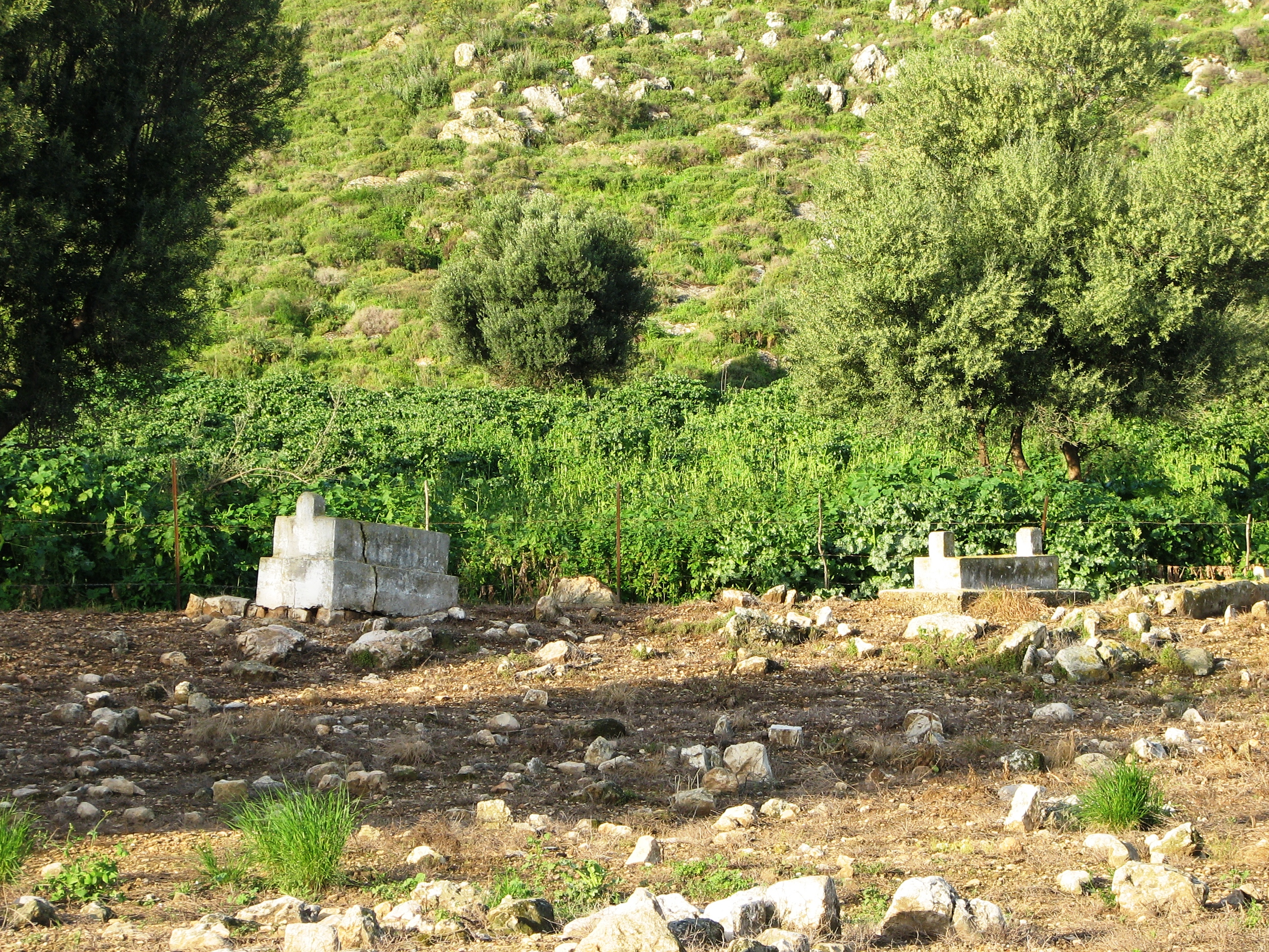 The Cemetery and area of Yajur. Arab village near Nesher abandon in 1948 – in Milhemet HaAtzma'ut בית הקברות של יאג'ור ואזור הכפר. כפר ערבי ליד נשר שניטש בעקבות מלחמת העצמאות על ידי תושביו. מהכפר נשאר רק בית הקברות ובריכת המים מעליו.